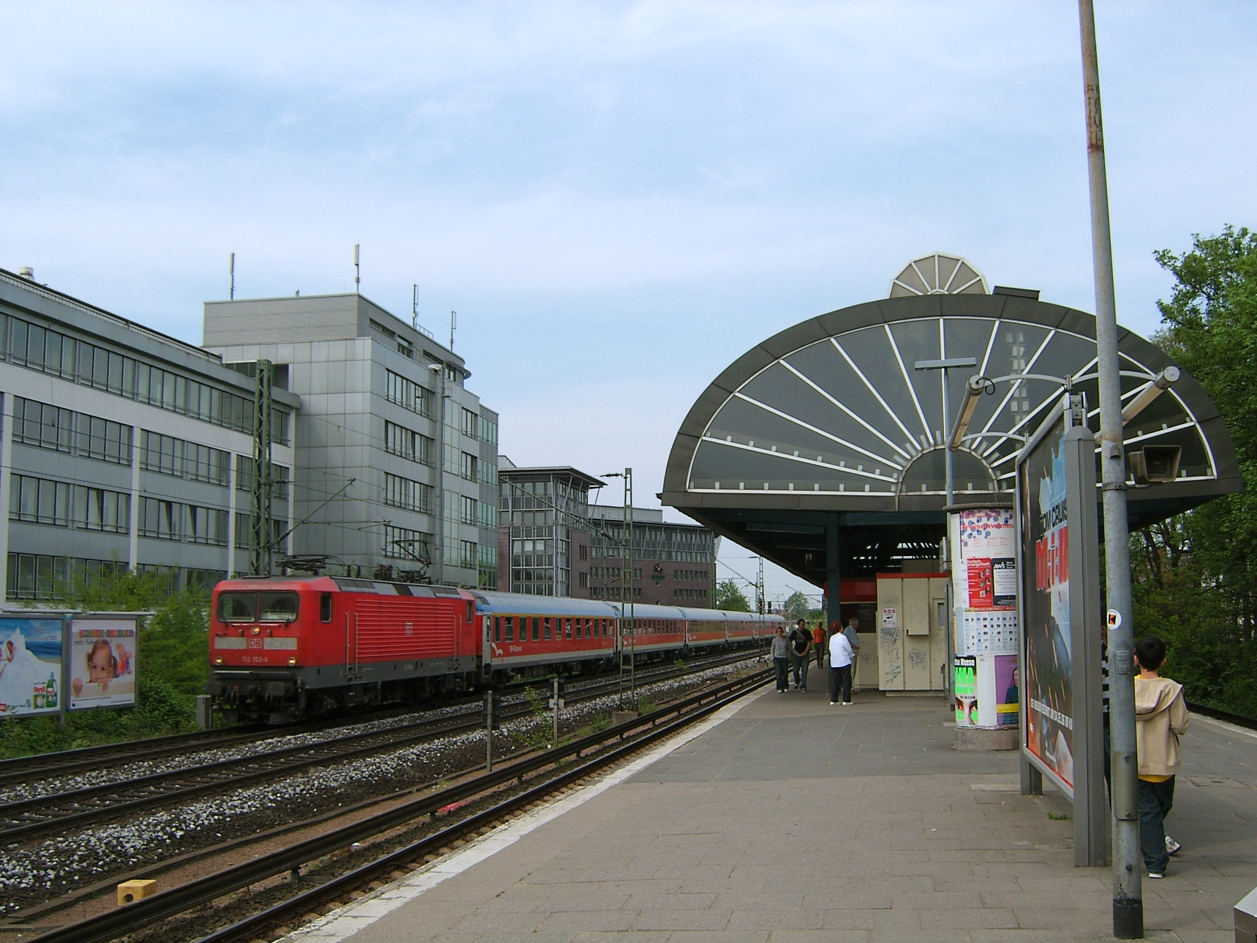 Bildbeschreibung: Hamburg, Altona, Bf. Holstenstraße Fotograf: selbst Datum: 13.5.2006